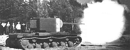 Испытания КВ-2 с пушкой ЗИС-6. На заднем плане стоят официальные лица, вероятно из Автобронетанкового управления РККА